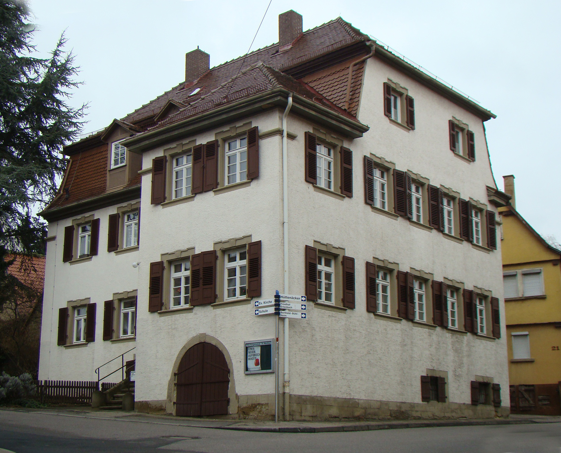 Pfarrhaus bei St. Martinus in Erlenbach